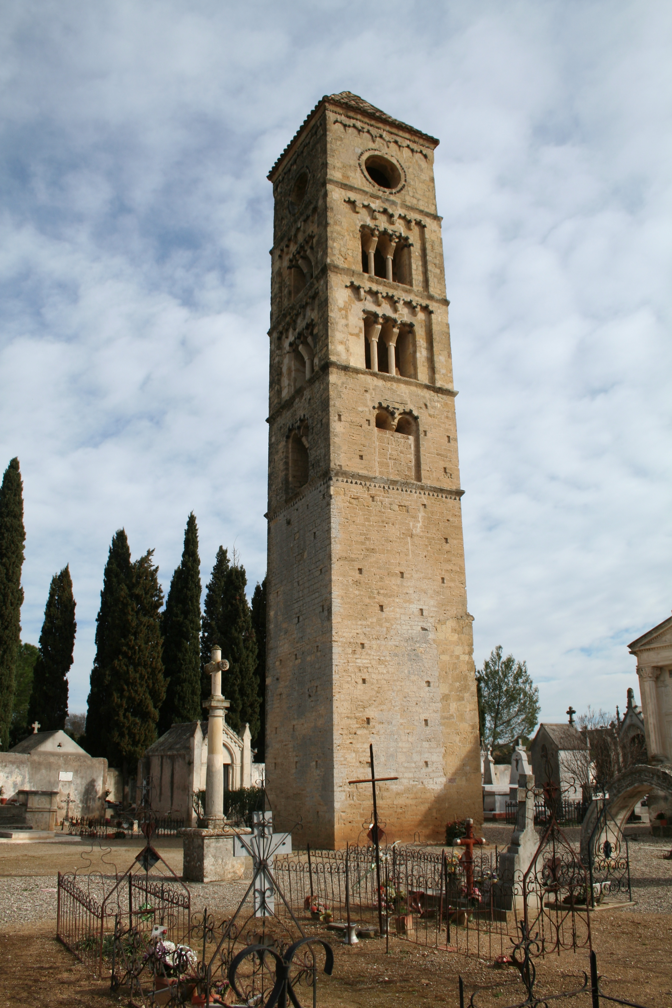 Puissalicon (Hérault) - clocher - (art roman).